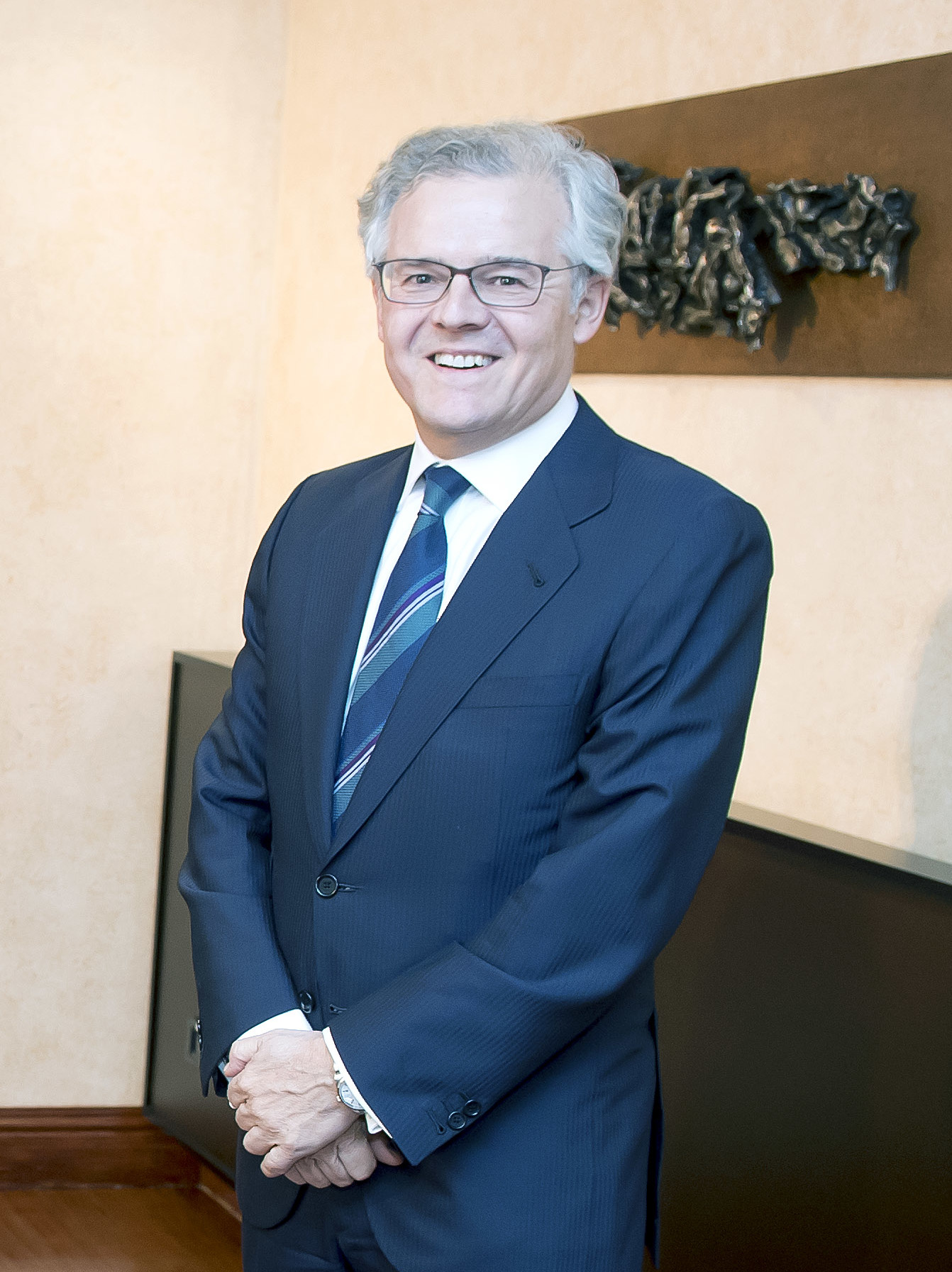 Lehendakaria Balore Merkatuaren Batzorde Nazionalaren presidentearekin elkartu da